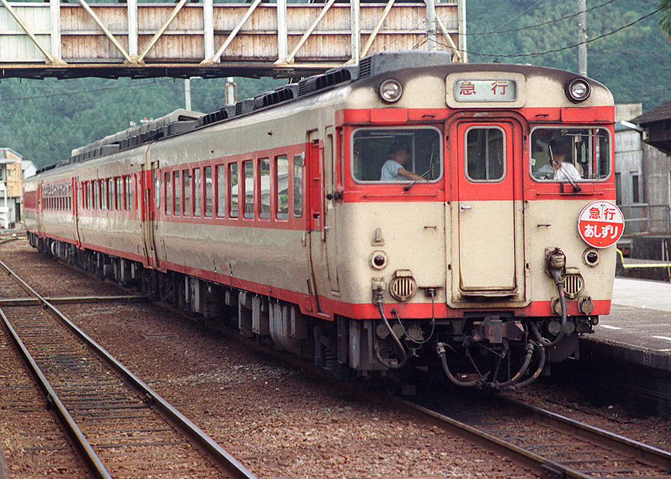 国鉄 キハ58系・キハ65形急行形気動車 急行 あしずり 須崎駅にて